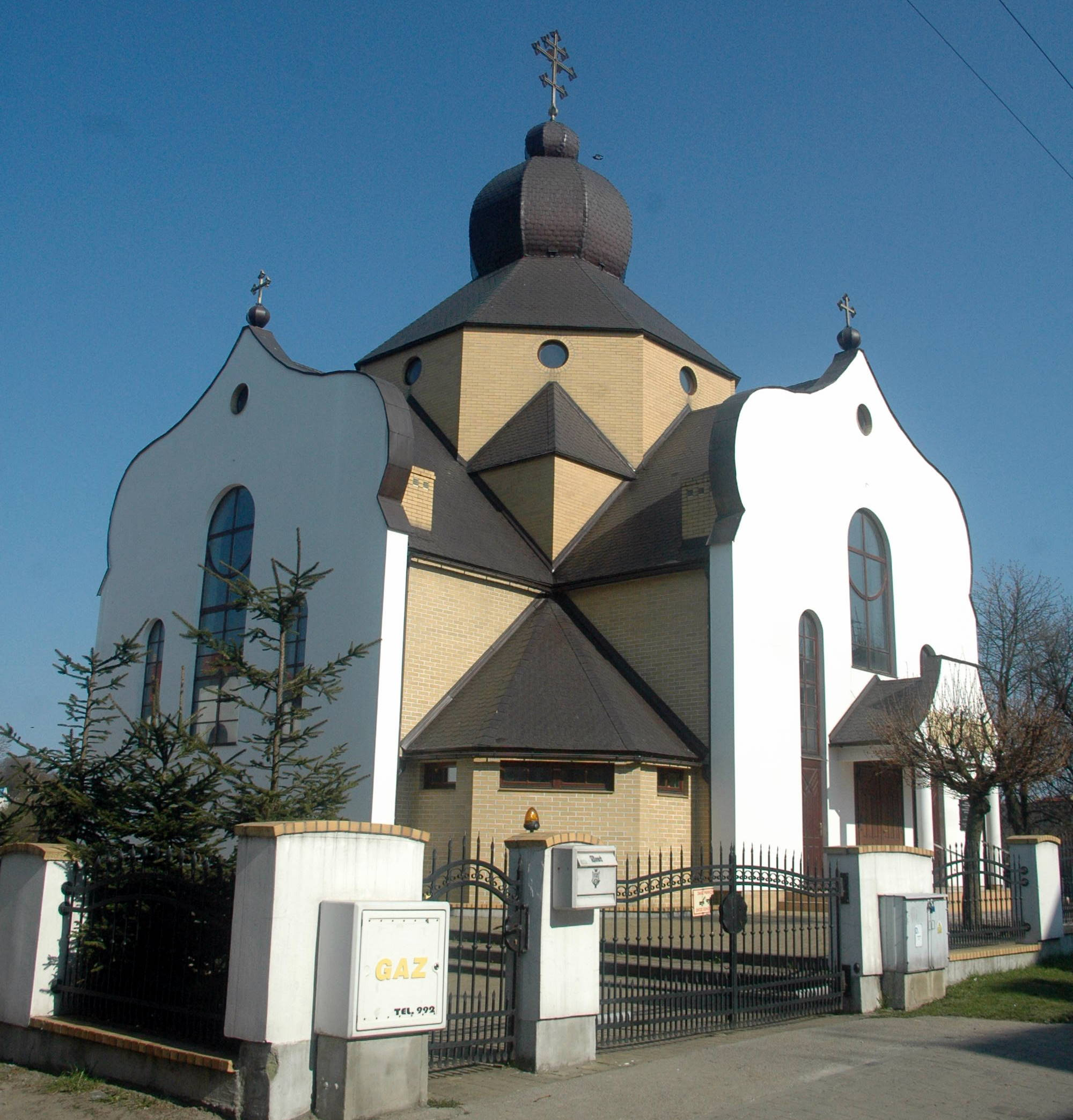 Cerkiew Zaśnięcia Najświętszej Bogurodzicy w Koszalinie.